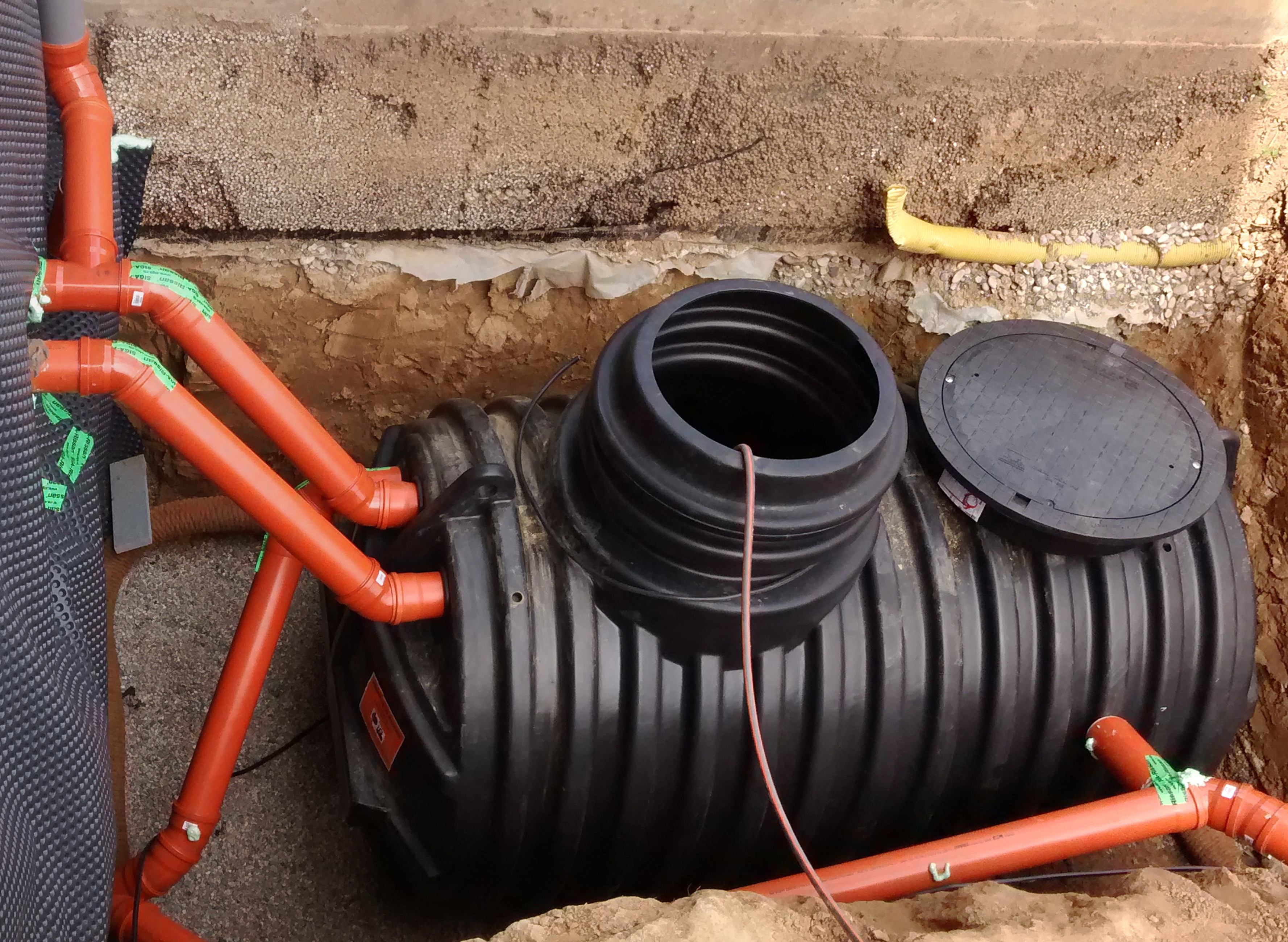 Kunststoffzisterne 3m³